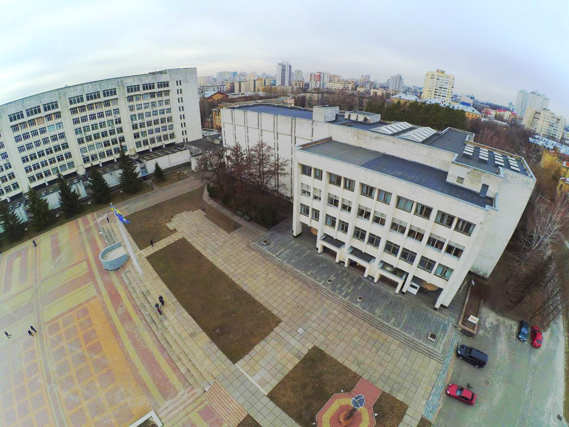 Фото науково-технічної бібліотеки ім. Г.І.Денисенка НТУУ "КПІ"